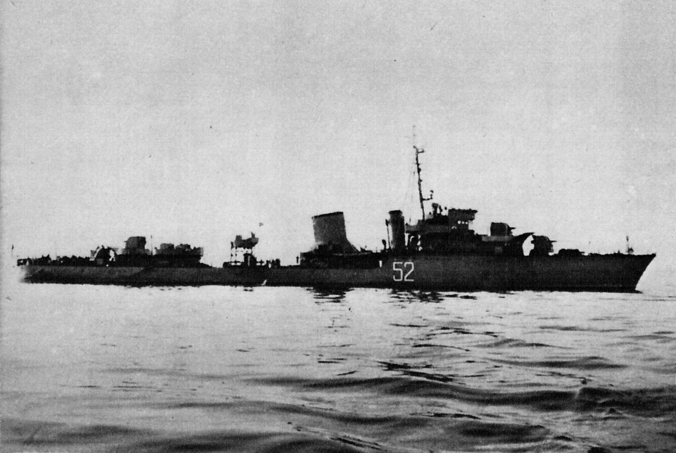 Niszczyciel ORP "Burza" po przebudowie na okręt obrony przeciwlotniczej